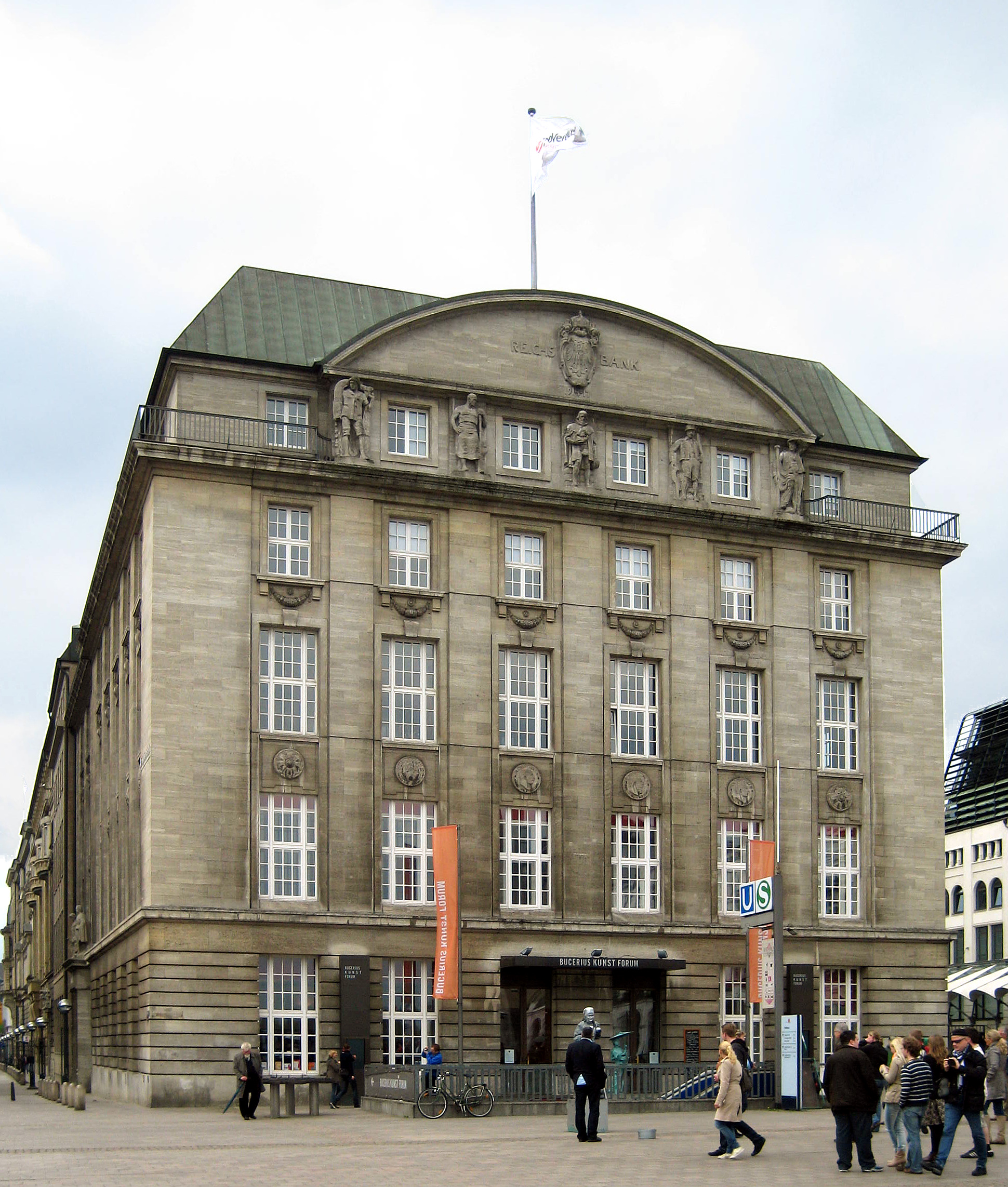 Das Bucerius Kunst Forum auf dem Rathausmarkt in Hamburg, Deutschland. Ensemble Alter Wall 2-22, 32, Rathausmarkt 2. This is a photograph of an architectural monument. ,13812-4